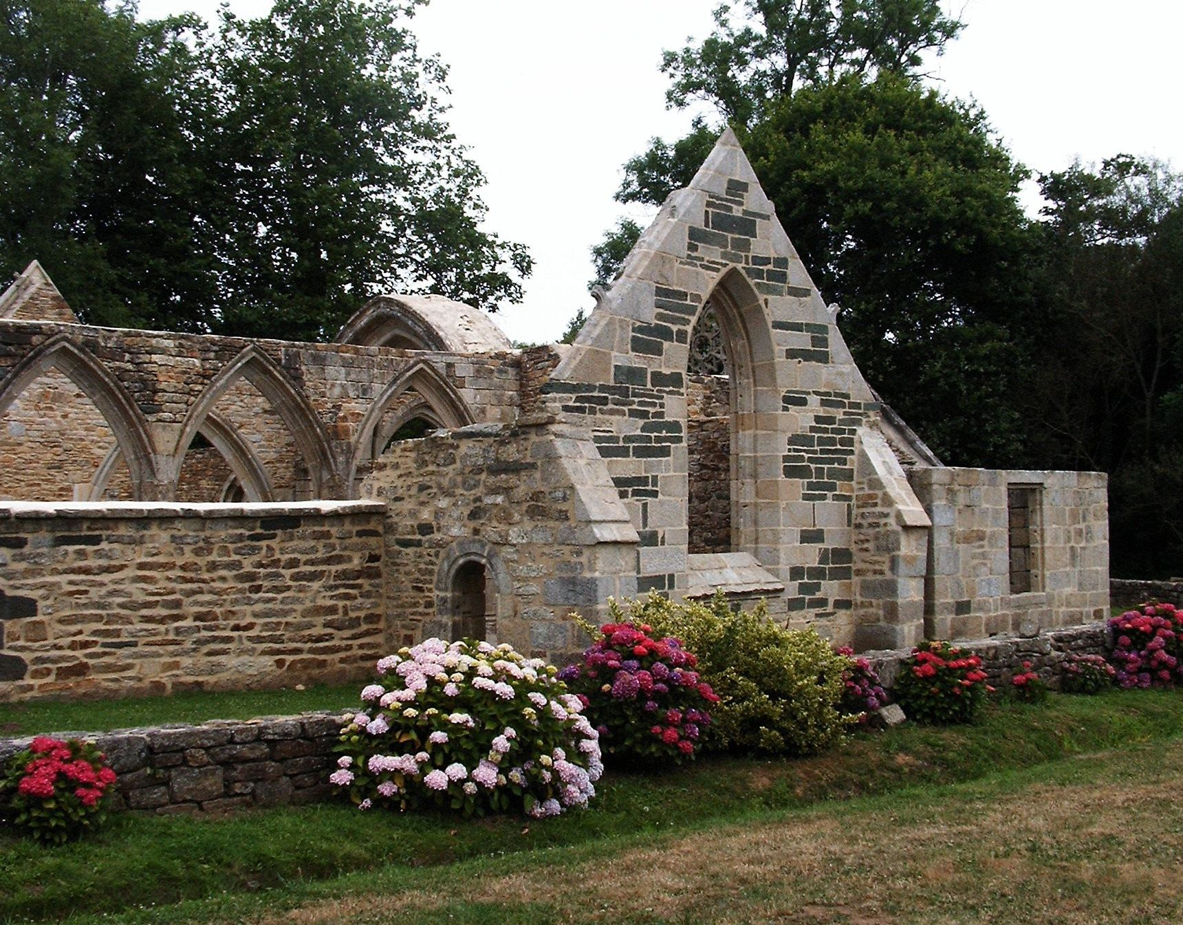 Ruine der Kirche St.Philibert in Plonéur-Lanvern